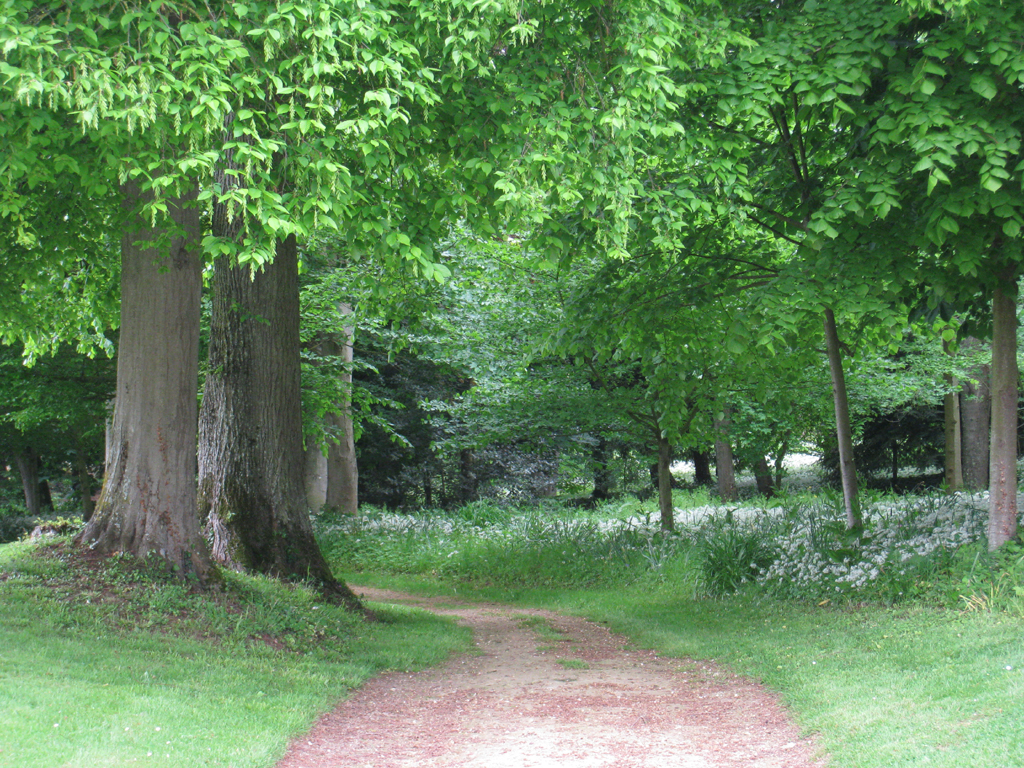 Allée principale menant au parc du château de Guernon-Ranville